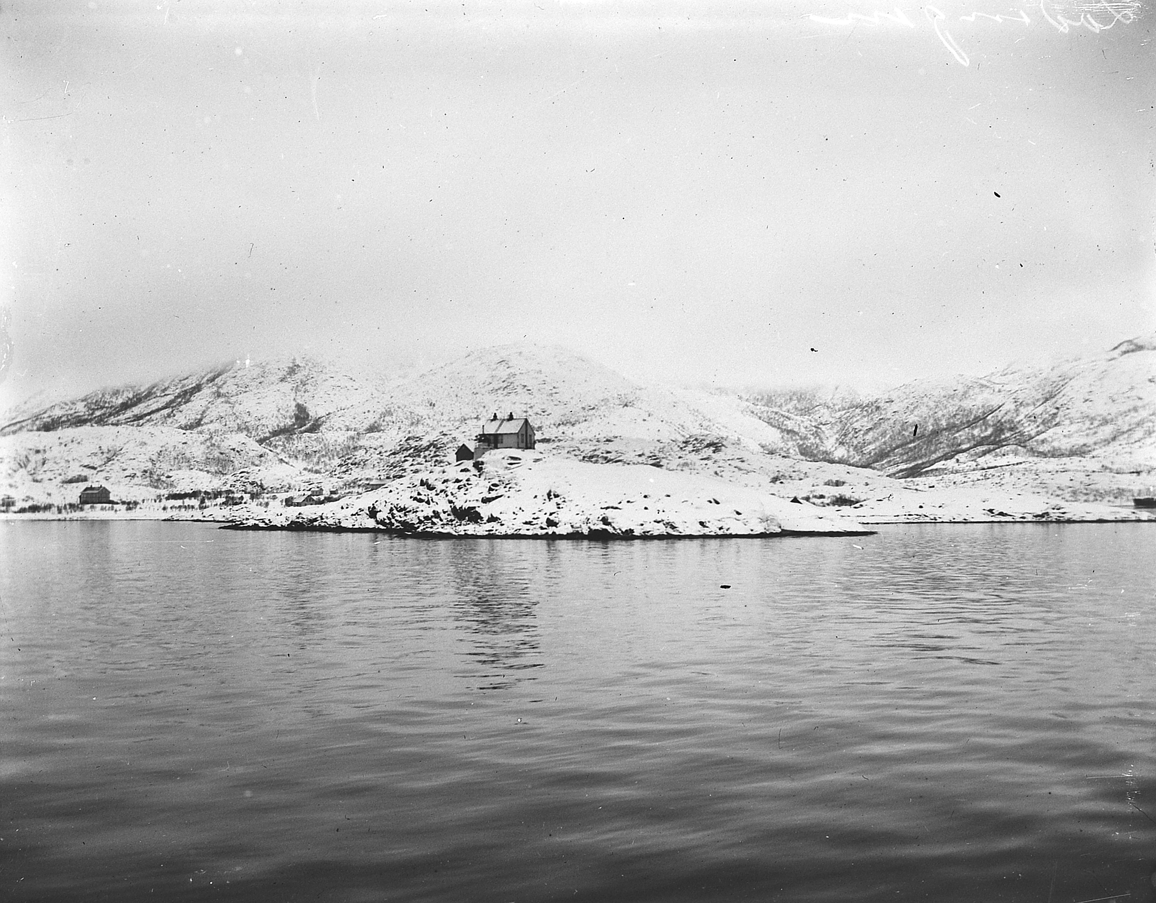 Bildet er hentet fra Arkivverket. Lødingen, Lødingen Arkivinstitusjon : Riksarkivet Arkivnavn : Fyrdirektoratet Sted : Norge, Nordland, Lødingen, Lødingen Emneord: Fyr, Kyst Avbildet